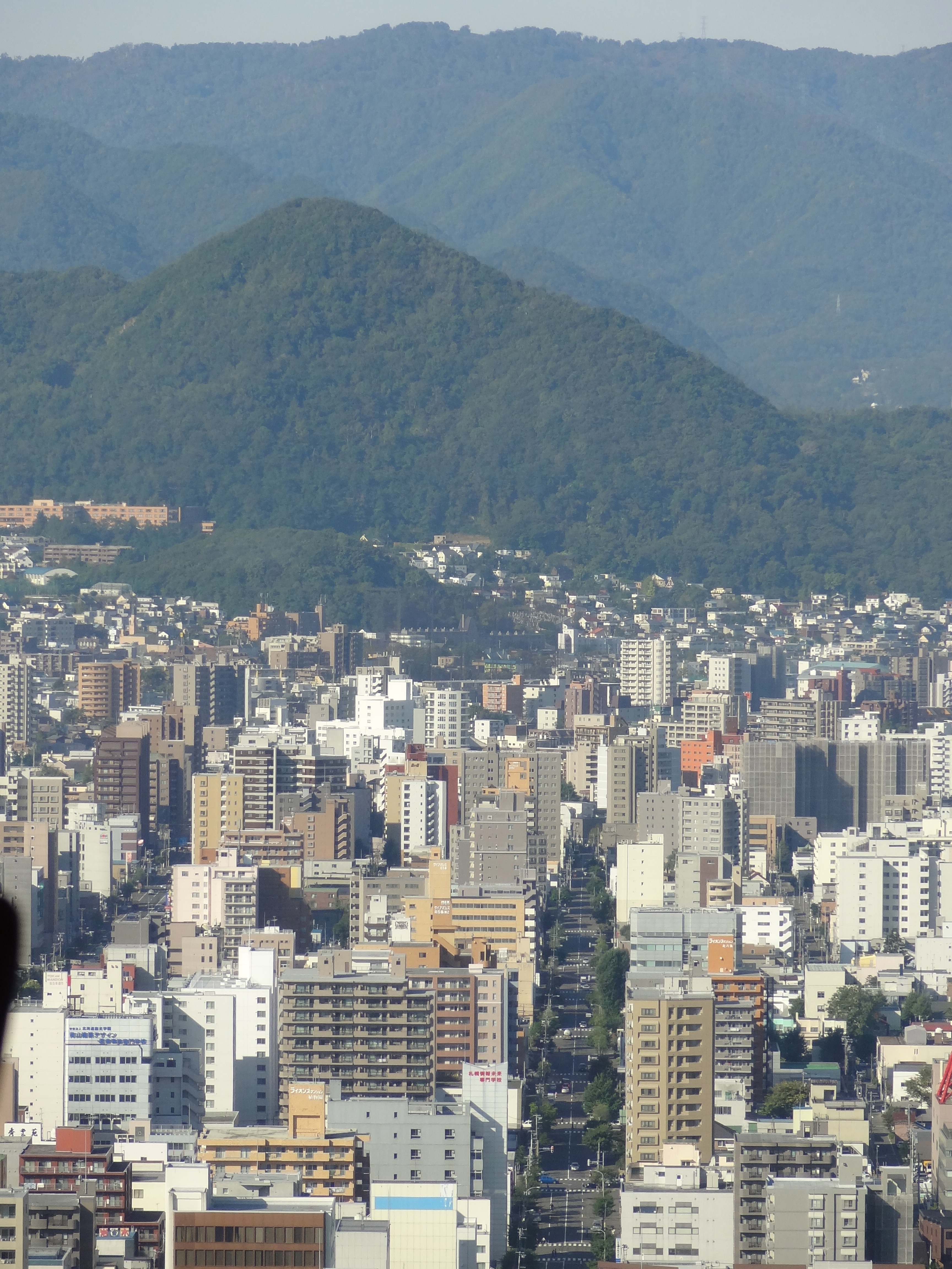 JRタワーから見た三角山 （2011年9月撮影）